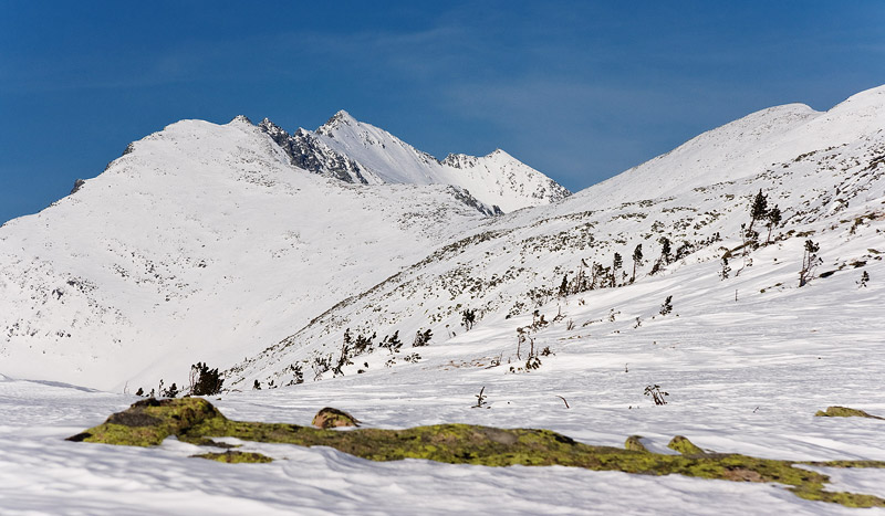 Хребет Тигир-Тыш, Кузнецкий Алатау